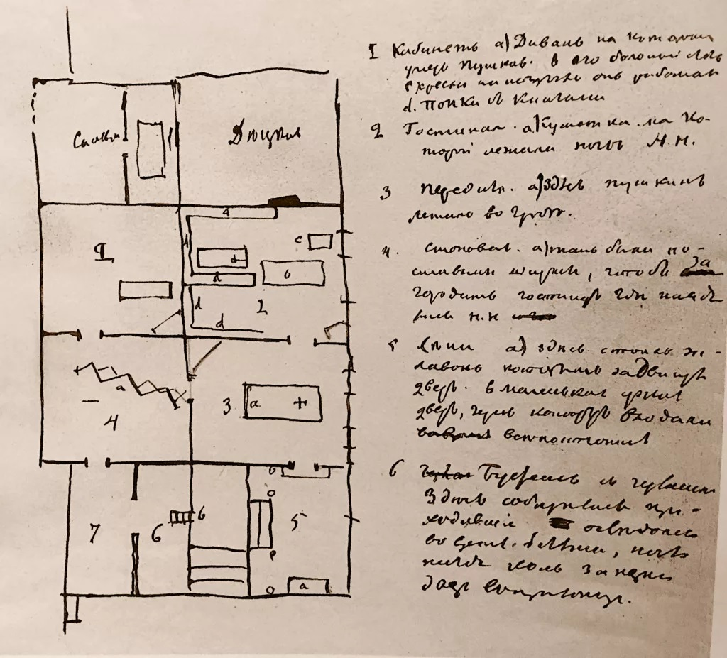 План квартиры А. С. Пушкина на Мойке, 12, зарисованный В. А. Жуковским, и пояснения к плану. 1837. «1. Кабинет: а) диван, на котором умер Пушкин; b) его большой стол; с) кресло, на котором он работал; d) полки с книгами. 2. Гостиная: а) кушетка, на которой лежала ночью Н Н . 3. Передняя: а) здесь Пушкин лежал во гробе. 4. Столовая: а) так были поставлены ширмы, чтобы загородить гостиную, где находилась Н Н . 5. Сени: а) здесь стоял залавок, которым задвинули дверь; b) маленькая узкая дверь, через которую входили все посторонние. 6. Буфет с чуланом, здесь собирались приходившие осведомиться во время болезни, ночью, тогда как заперли дверь в прихожую».